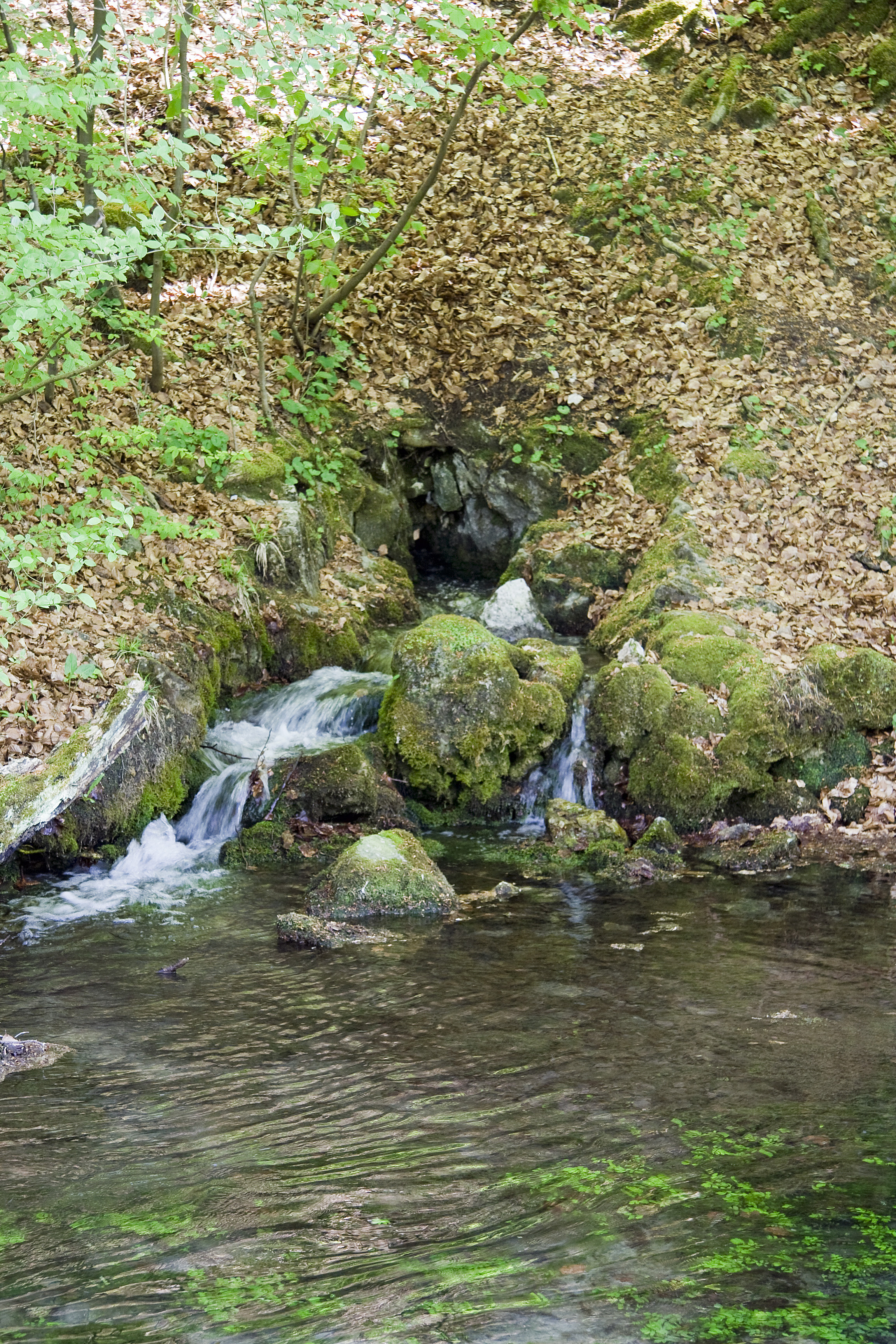 Quelle Nummer 104 der Almenquellen (Karstquellen der Alme).